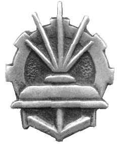 Własna praca Kwz